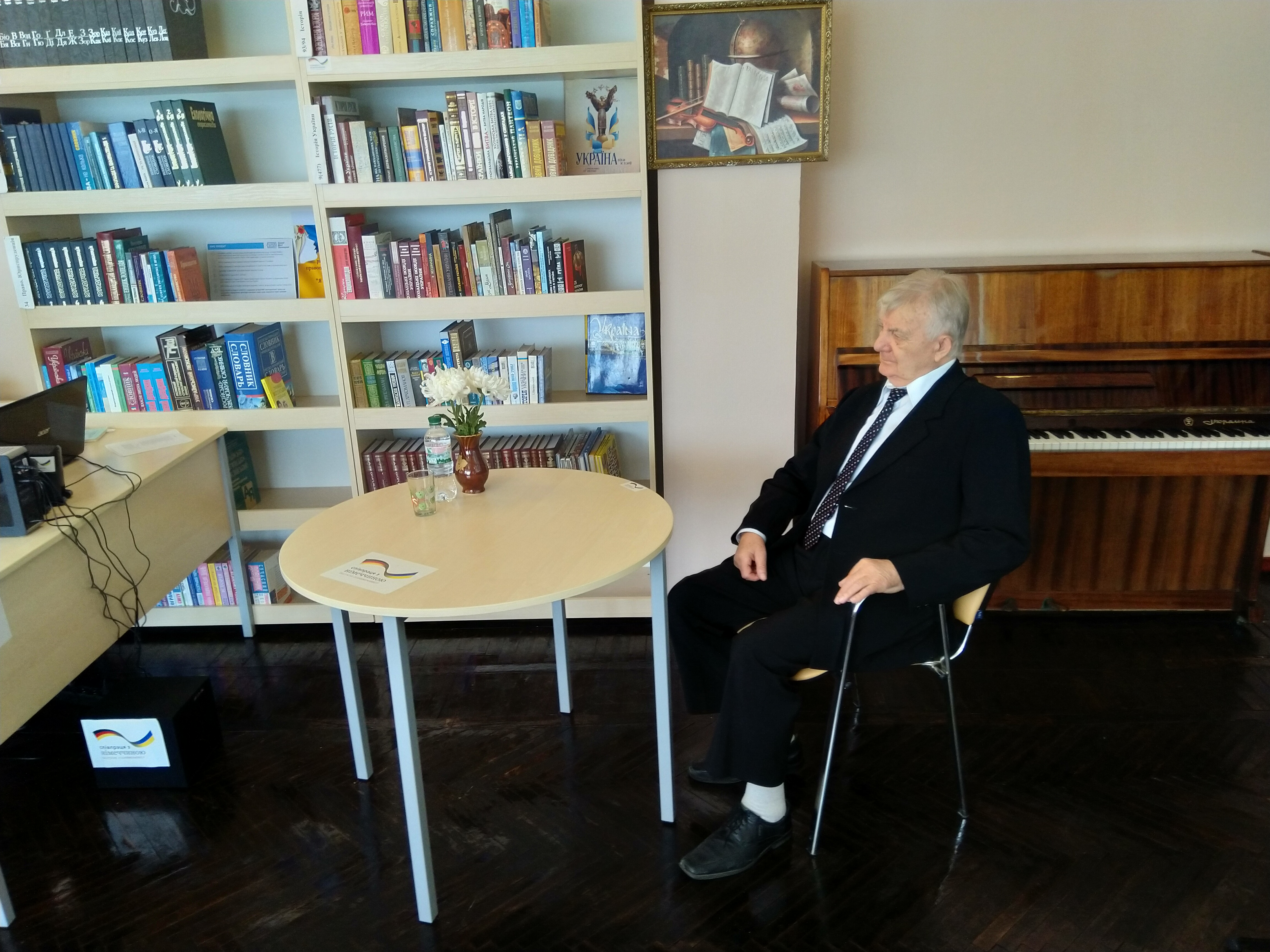 Гасенко Олексій Павлович. 80-річчя в КЗК «Покровська бібліотека».